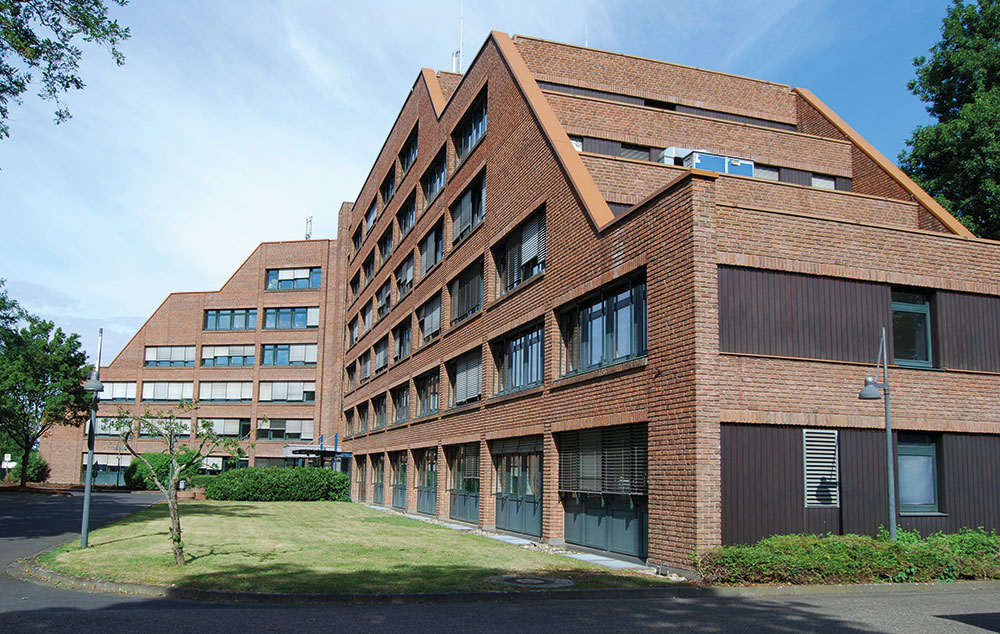 Neues Dienstgebäude des LVermGeo in Koblenz